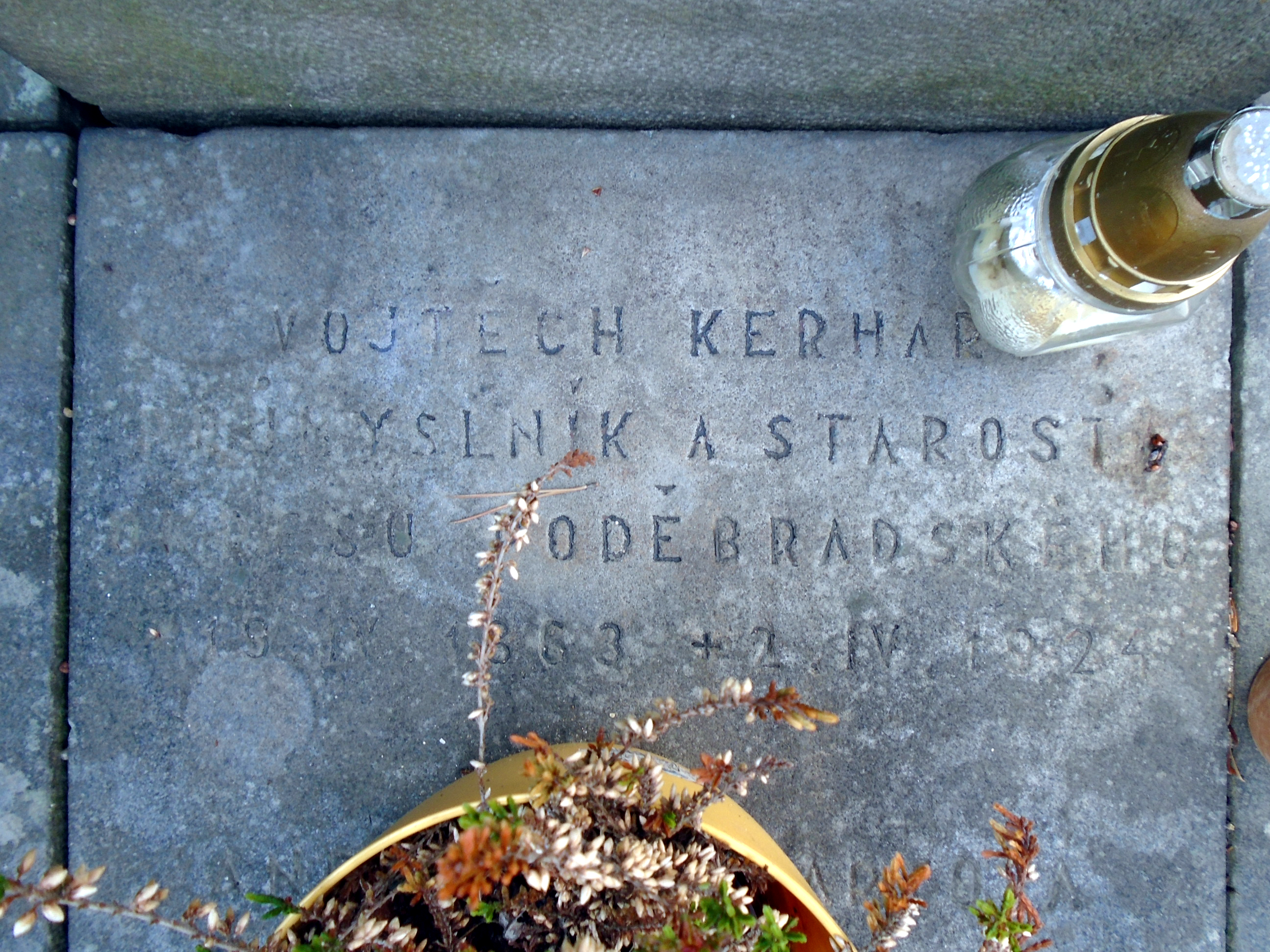 Hřbitov v Kluku. Hrobka Vojtěcha Kerharta.